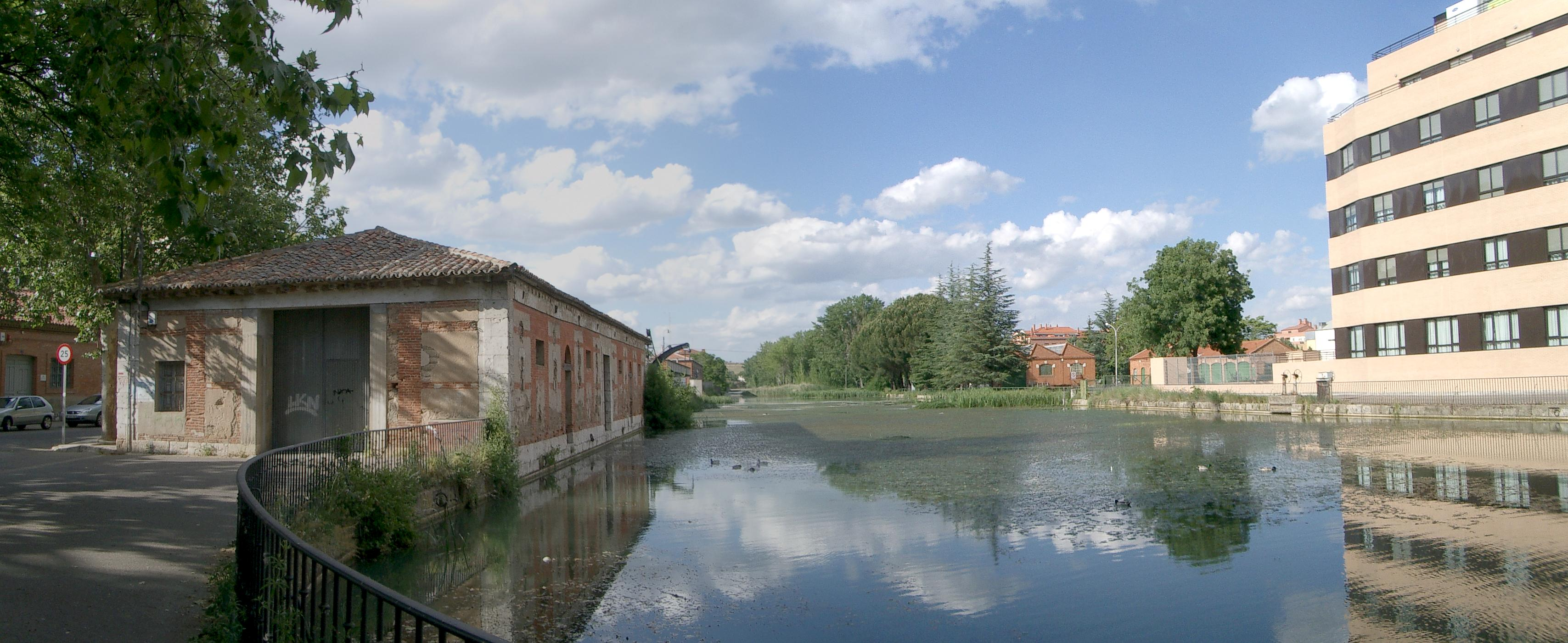 Panorámica de la dársena del Canal de Castilla en la ciudad de Valladolid (España)